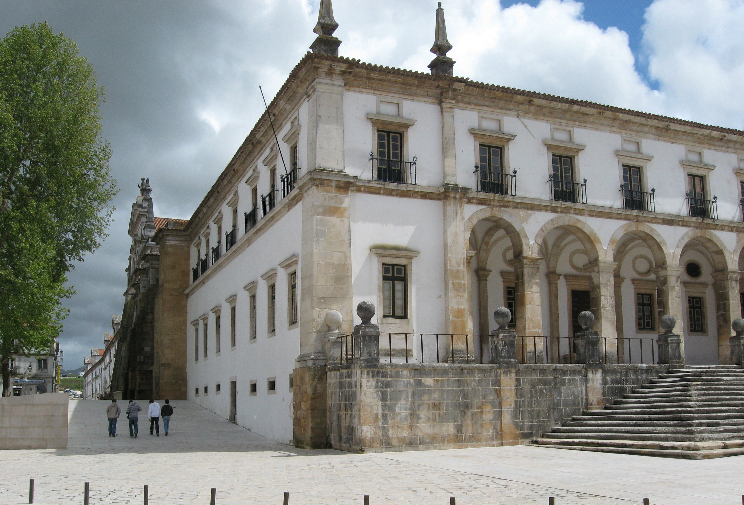 Mosteiro de Alcobaça, north side, corner south, Praça Afonso Henriques, Rua D. Pedro V.